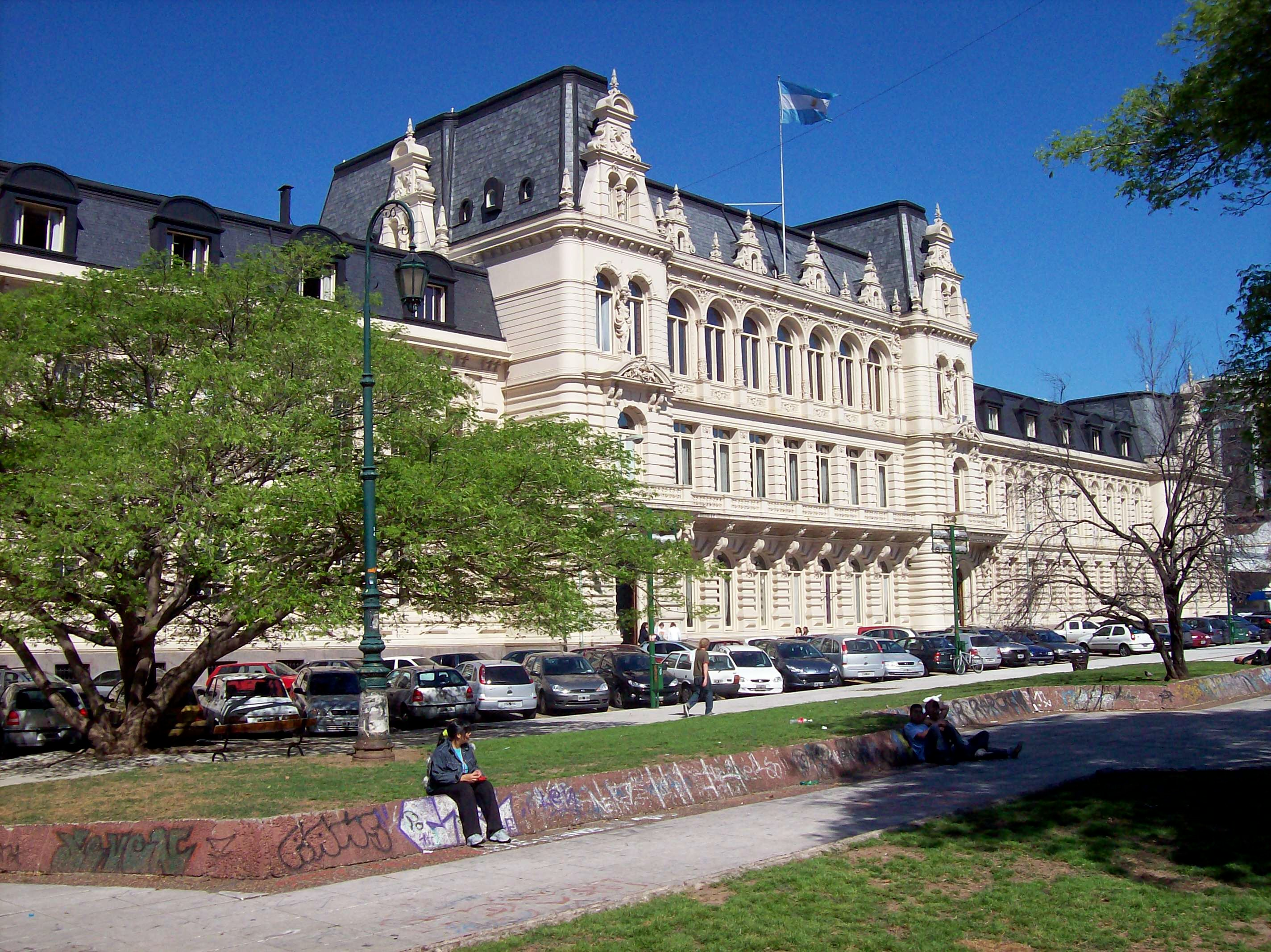 Palacio Pizzurno (Ministerio de Educación), en Recoleta, Buenos Aires.